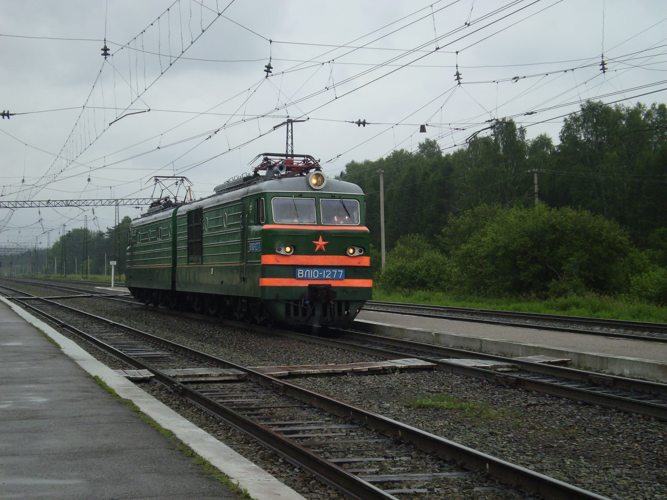 Электровоз ВЛ-10 прибывает к станции Издревая (г.Новосибирск).